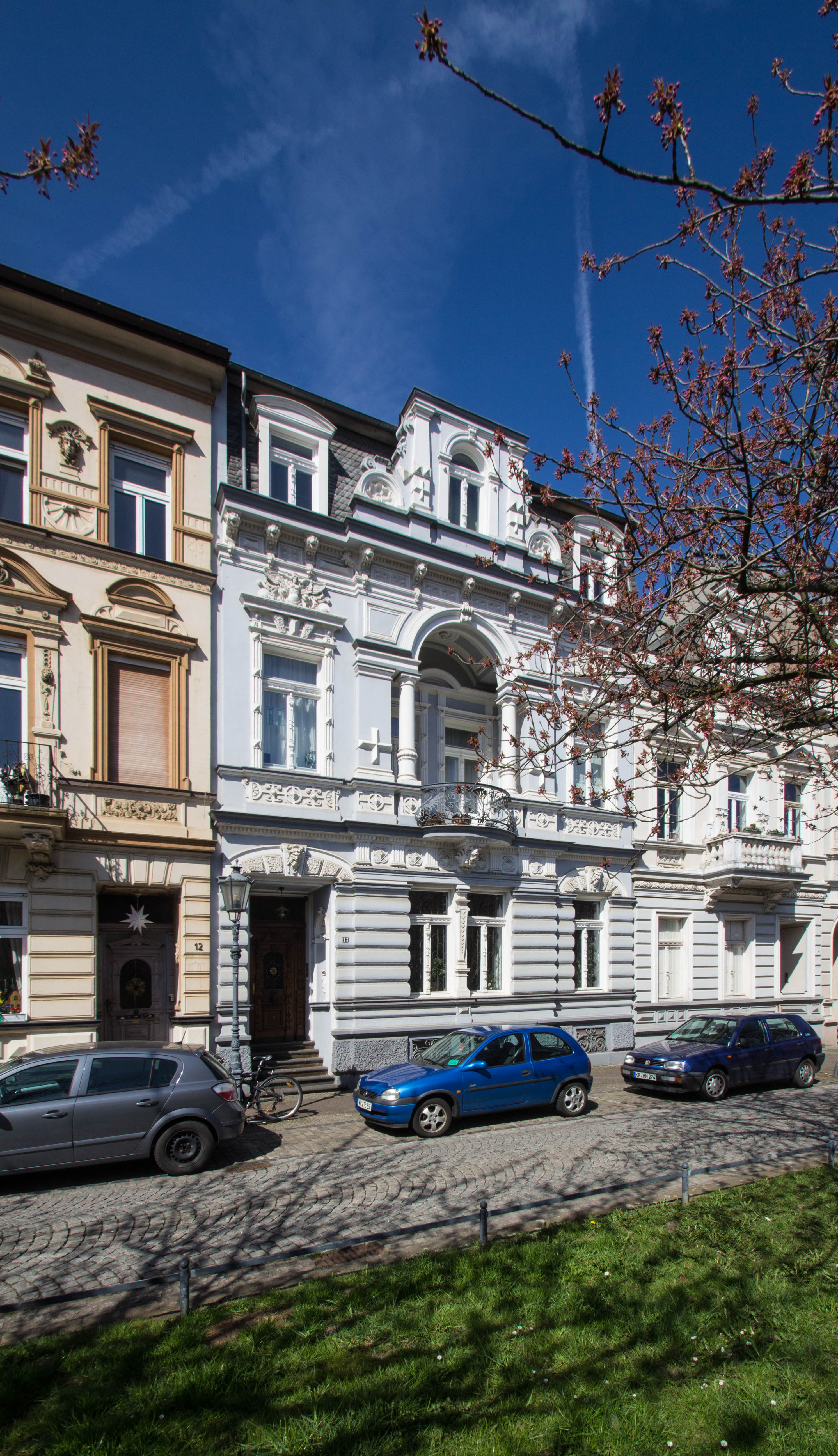 Krefeld, Alexanderplatz 13 This image shows a heritage building in Germany, located in the North Rhine-Westphalian city Krefeld (no. 783).